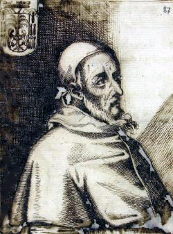 Andrea Matteo Cardinale Palmieri